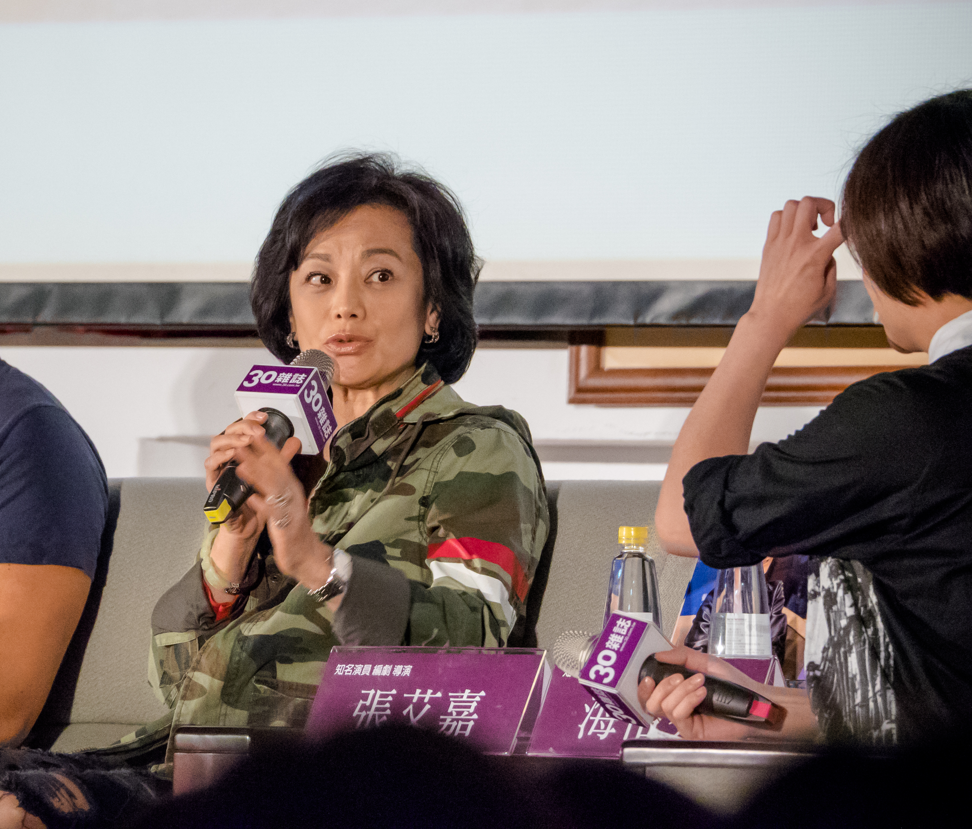 電影《念念》導演張艾嘉出席《念念》宣傳座談會。